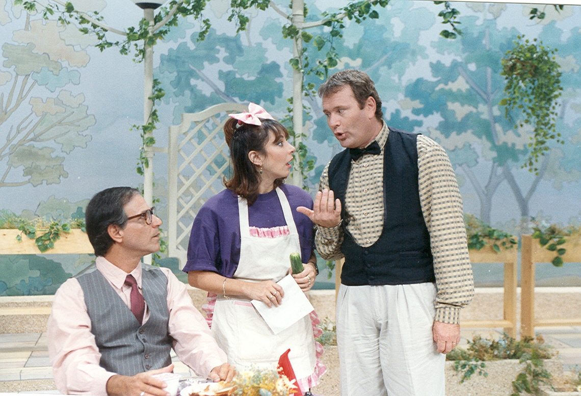 בלי סודות הייתה תוכנית טלוויזיה לימודית, אשר שודרה בטלוויזיה החינוכית הישראלית באמצע שנות השמונים, בהמשך בגלל הפופולריות הגדולה נוצרה תוכנית המשך, "בסוד העניינים", אשר הופקה בשנים 1991-1992.